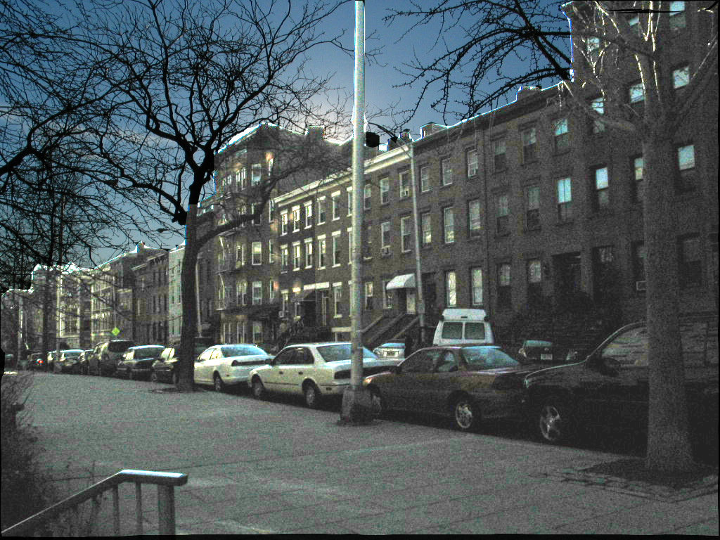 HudsonStreet in Hoboken, NJ